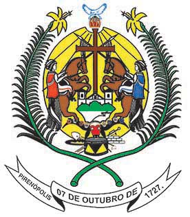 Brasão do Município de Pirenópolis, Goiás.